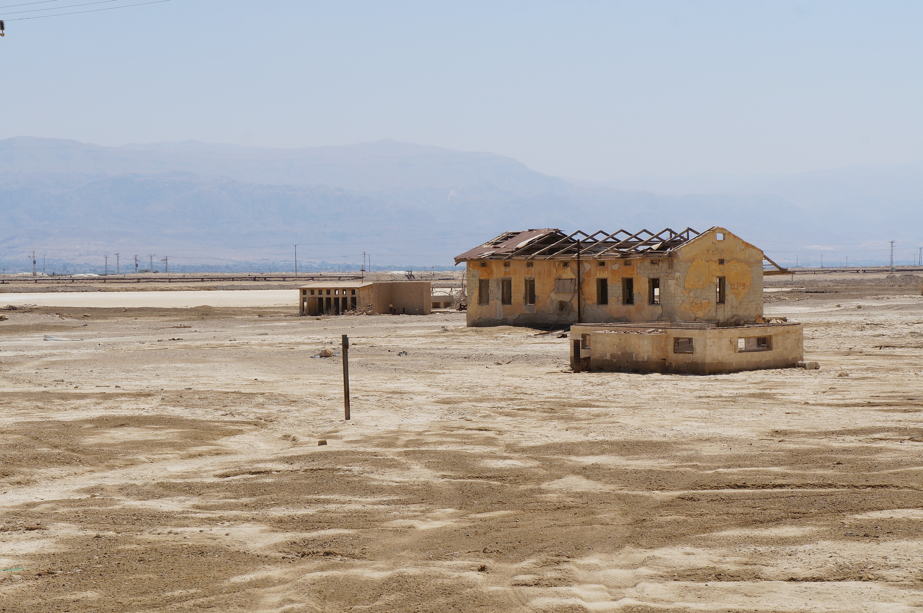 מפעל המלח בסדום או בשמו הידוע יותר "מחנה העובדים בסדום" של חברת האשלג, הינו המפעל הדרומי והמאוחר מבין שני המפעלים שהוקמו לחופי ים המלח לפני קום המדינה. המפעל הוקם בשנת 1934 באגנו הדרומי של ים המלח ביחד עם מחנה העובדים שלרגלי הר סדום על ידי משה נובומייסקי והמהנדס הבריטי תומאס גריגורי טולוק.